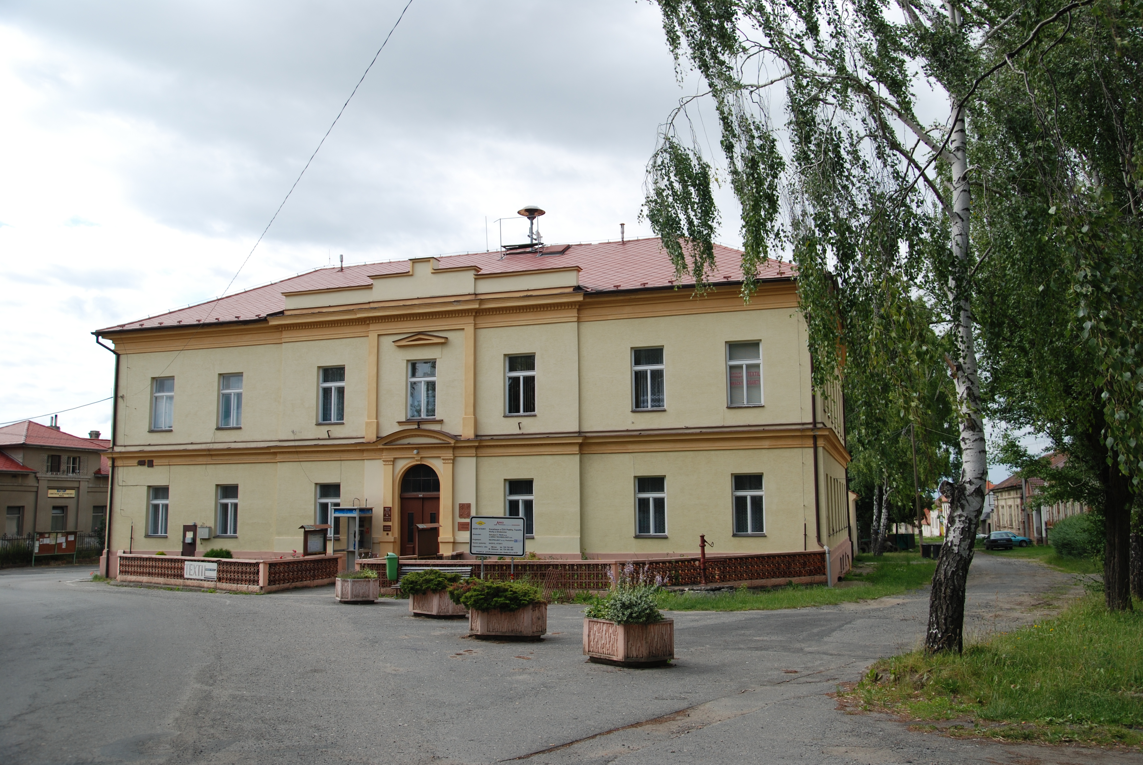 Potěhy Obecní úřad